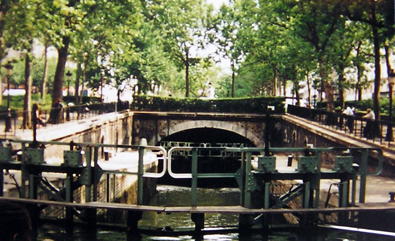 Canal Saint-Martin écluse